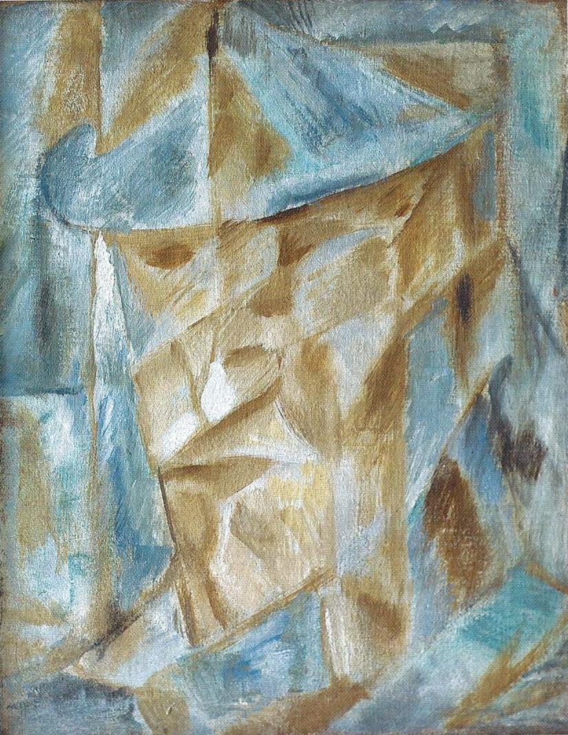 Михаил Ле-Дантю. Портрет актёра. 1912. Холст, масло. 67х52